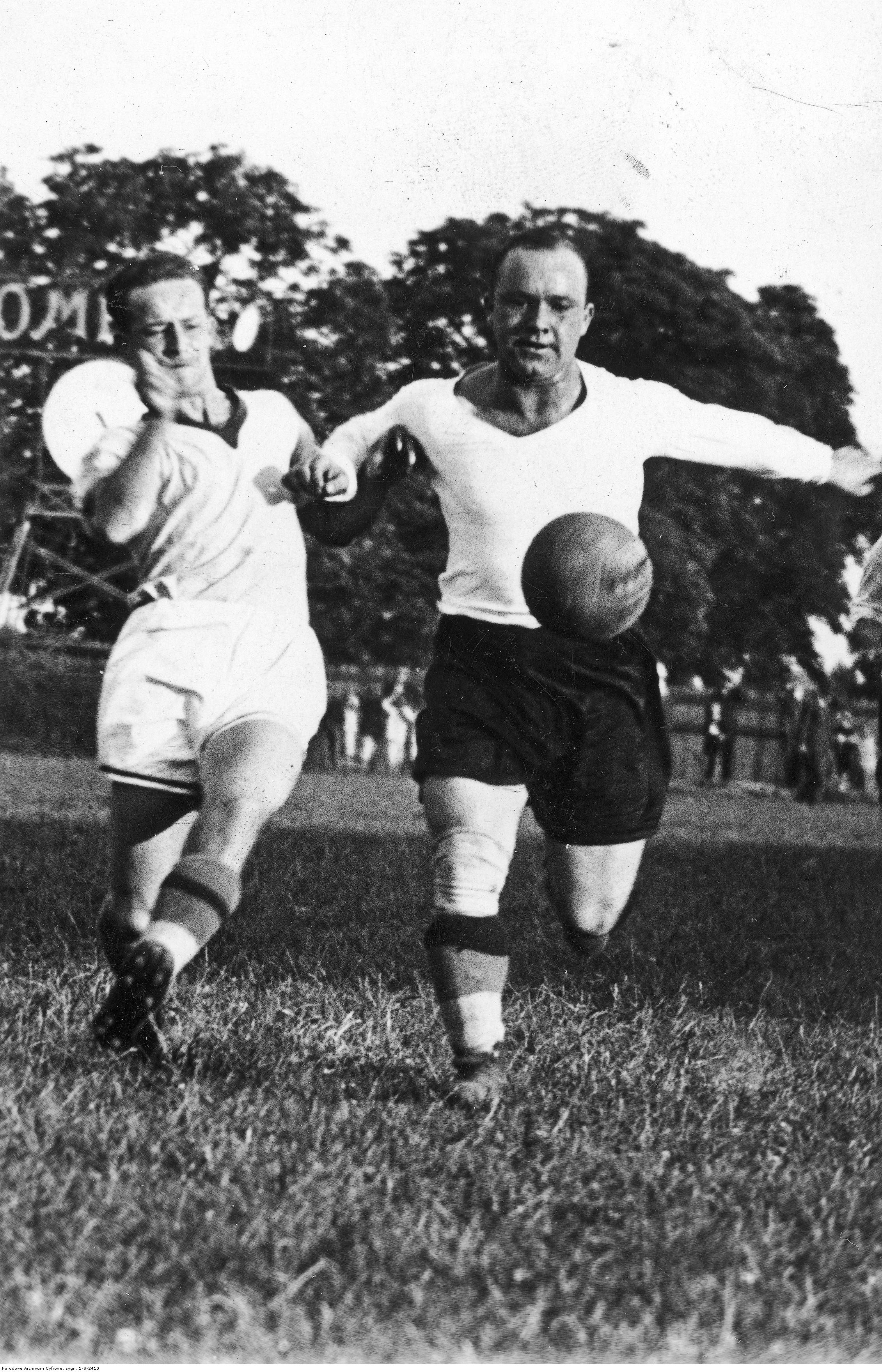 Fragment meczu. W akcji widoczni Henryk Martyna (z prawej) i Adolf Zimmer.